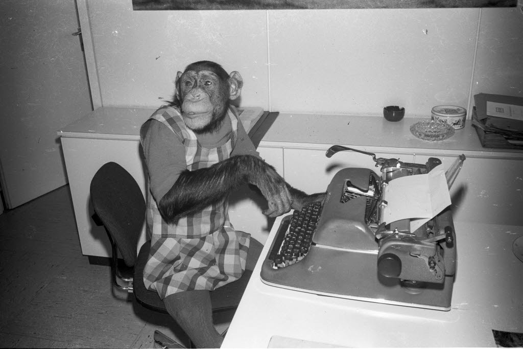 Die aus der Fernsehserie Daktari bekannte Schimpansendame Judy besucht die Redaktion.